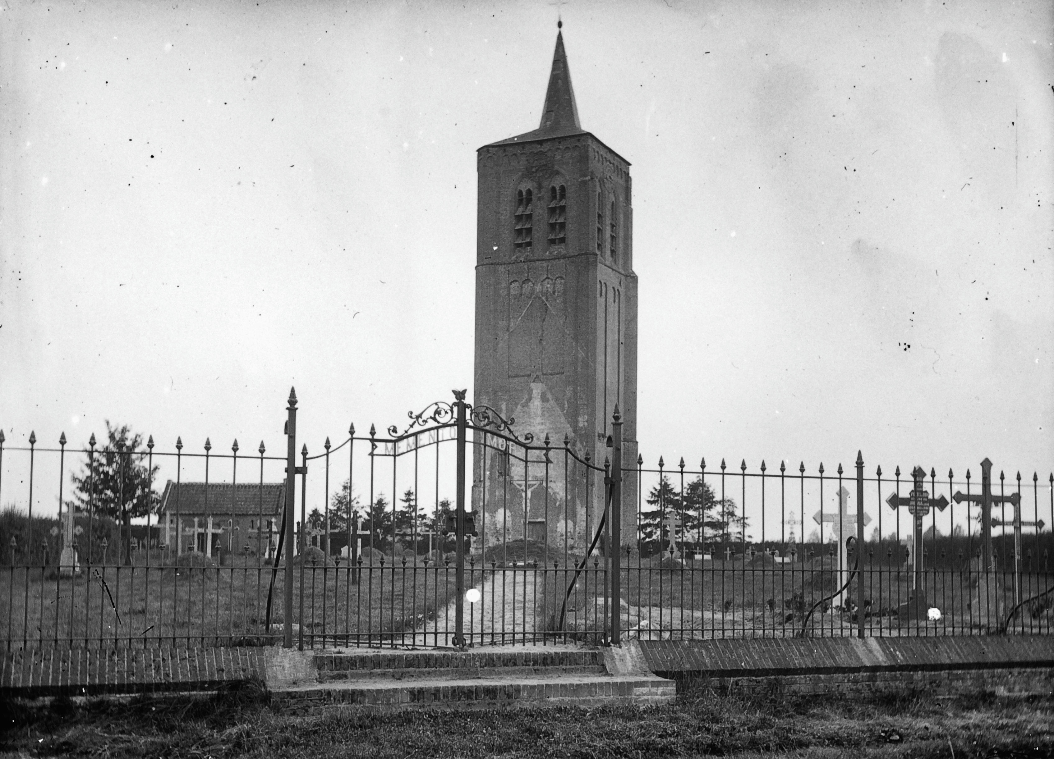 Toren/ Kerktoren: Vrijstaande toren achter hekwerk